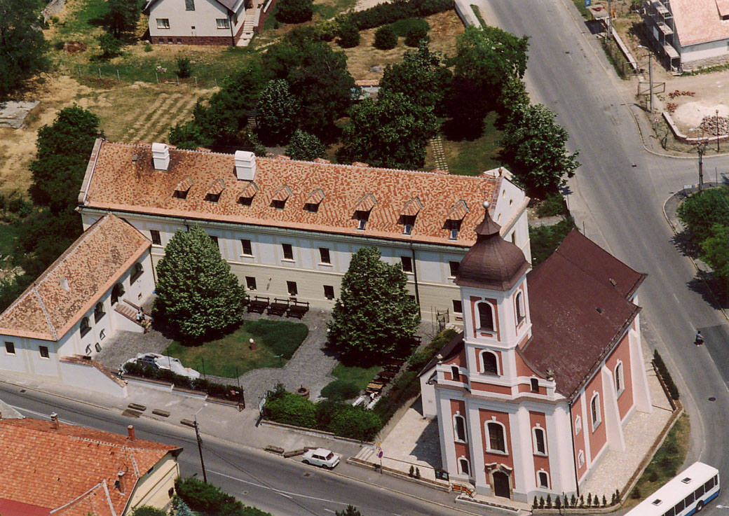 Loyolai Szent Ignác római katolikus templom (9659. számú műemlék) Barokk, 1777-1779. Belsőben falfestmények, barokk, 18. sz. második fele. Berendezés: főoltár, négy mellékoltár, szószék, Szt. Sír-kápolna oltára, sekrestyeszekrény, szenteltvíztartók, késő barokk, 1779. Sekrestyepad, barokk, 18. sz. és az egykori jezsuita rendház (9661. számú műemlék) Barokk, 18. sz. Most oktatási központ és szállás. - Balatonalmádi, (Vörösberény), Veszprémi u.